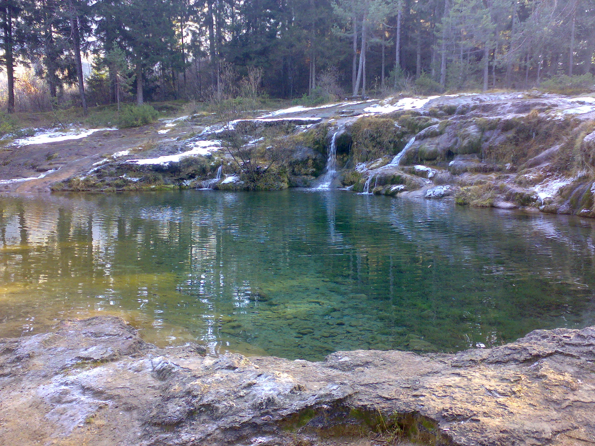 Laghetto "de le femenes", Lagole, Calalzo di Cadore